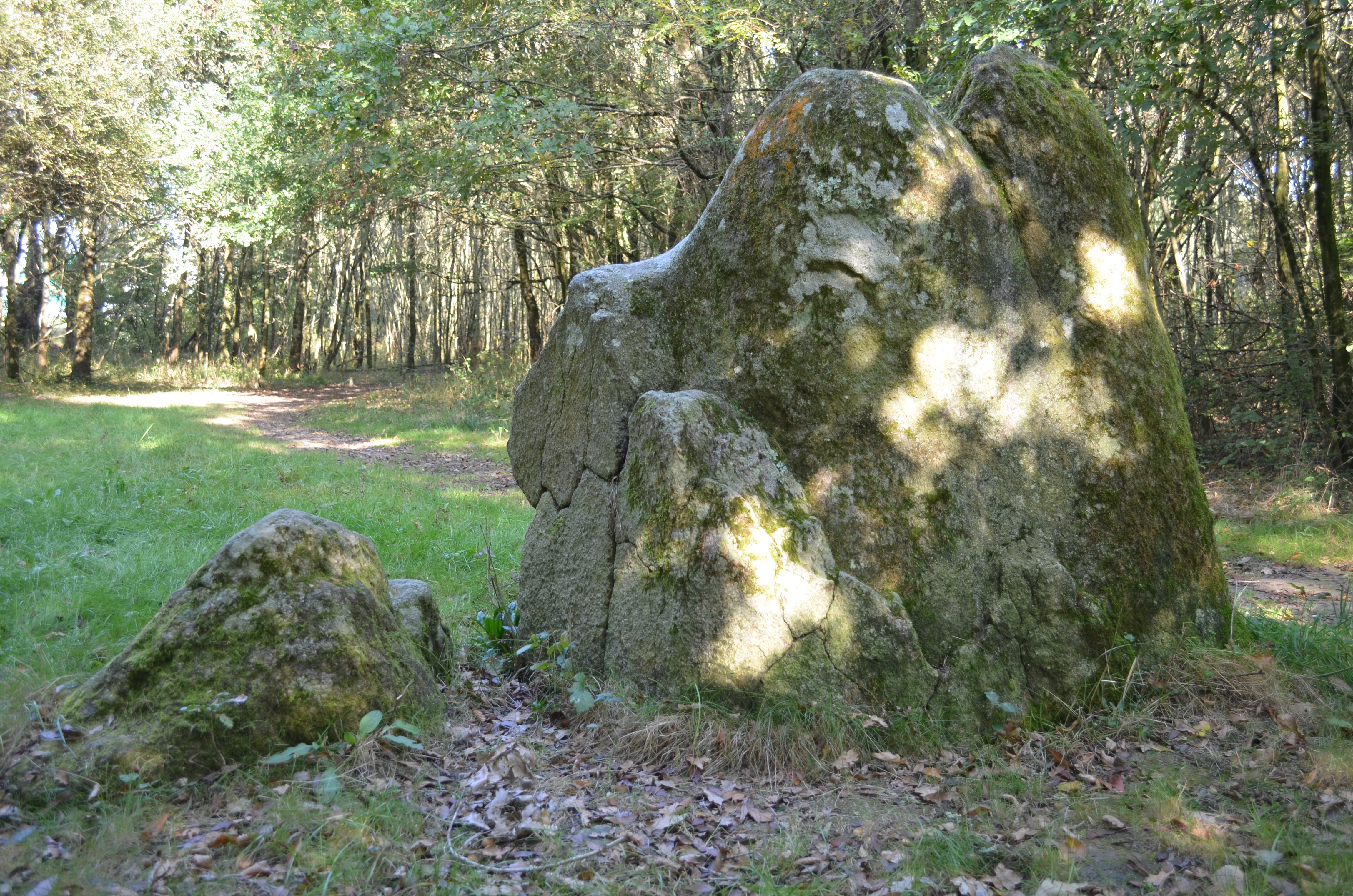 Menhirs des Dames de pierre - Pont-Saint-Martin (Loire-Atlantique) .